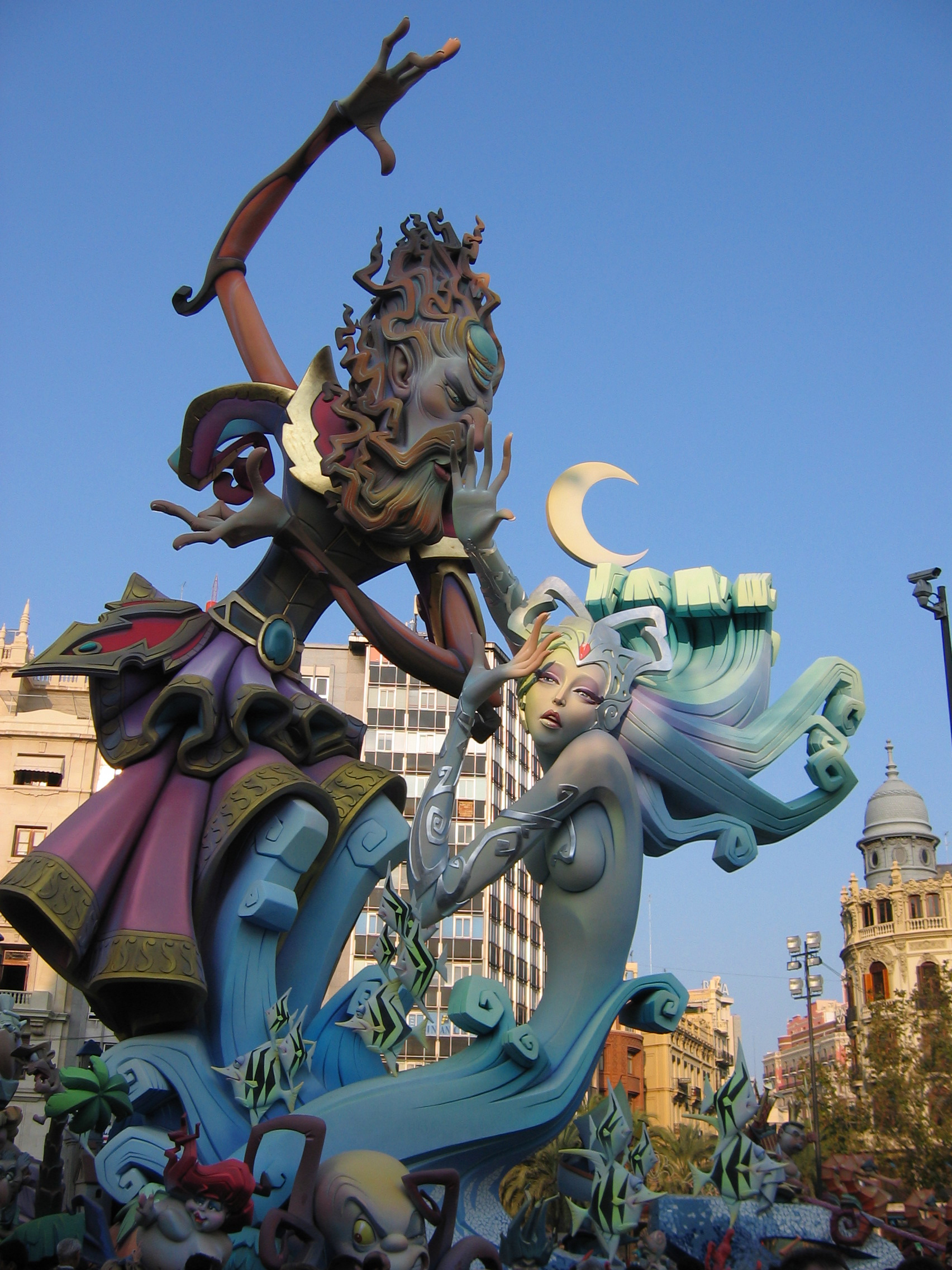 Falla de la Plaza del Ayuntamiento, Valencia. Marzo del 2007